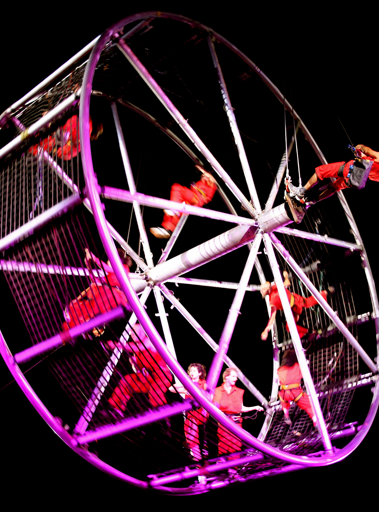 La Fura dels Baus (Spain)